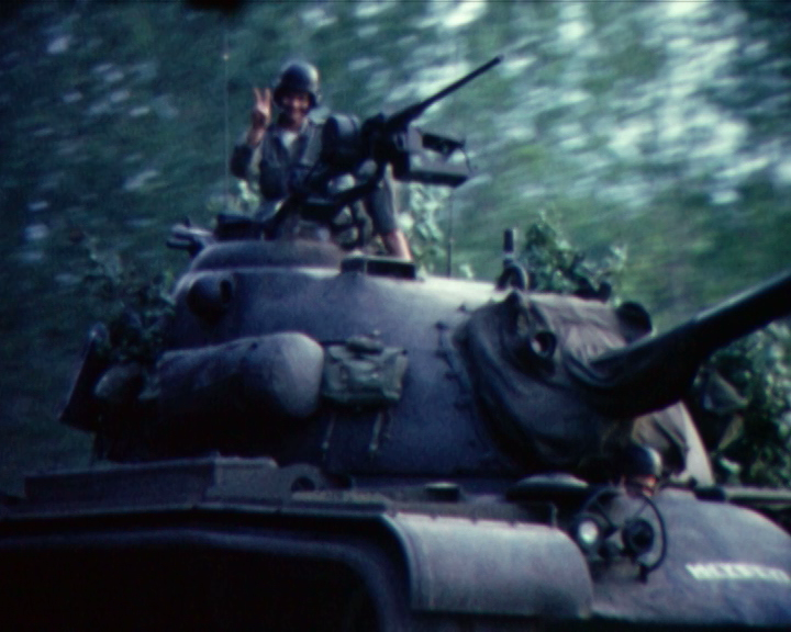 Zypernkonflikt 1974: Panzer der griechischen Armee (Region Katerini) in der Verlegung zur türkischen Grenze.